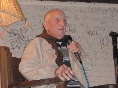 Version escalada, para el articulo en wikipedia